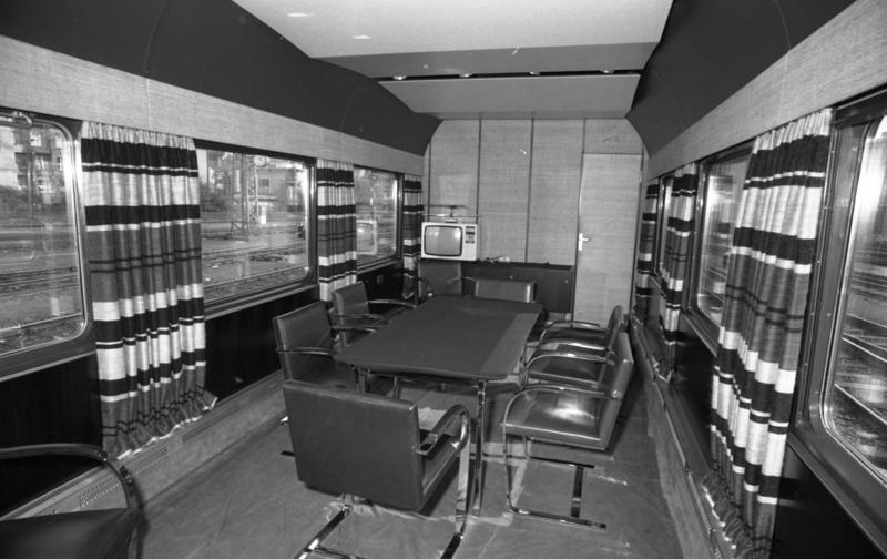 Salon-Zug der Deutschen Bundesbahn (für geplanten DDR-Besuch von Bundeskanzler Helmut Schmidt) [Bundesbahnsonderwagen, alt + neu, in Köln]